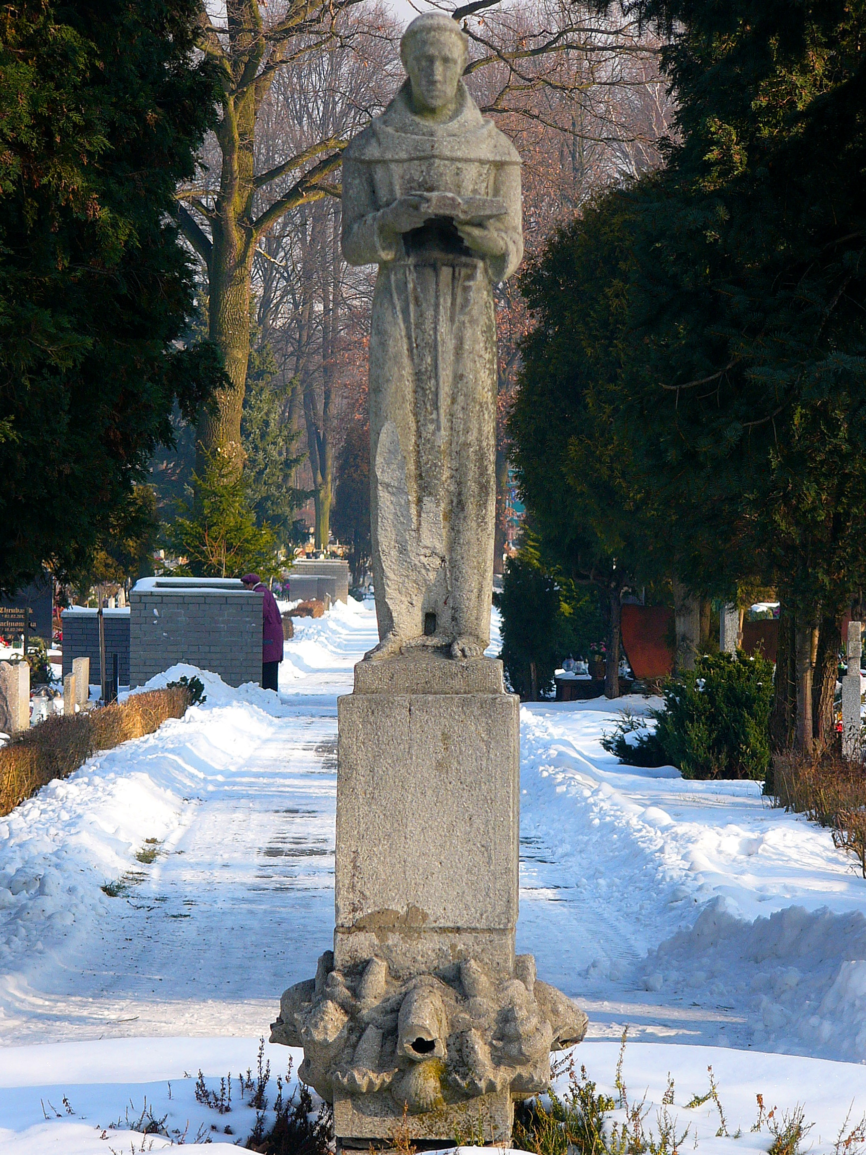 Hl. Franz auf dem Zentralfriedhof in Gleiwitz. Ein Werk von Hanns Breitenbach.